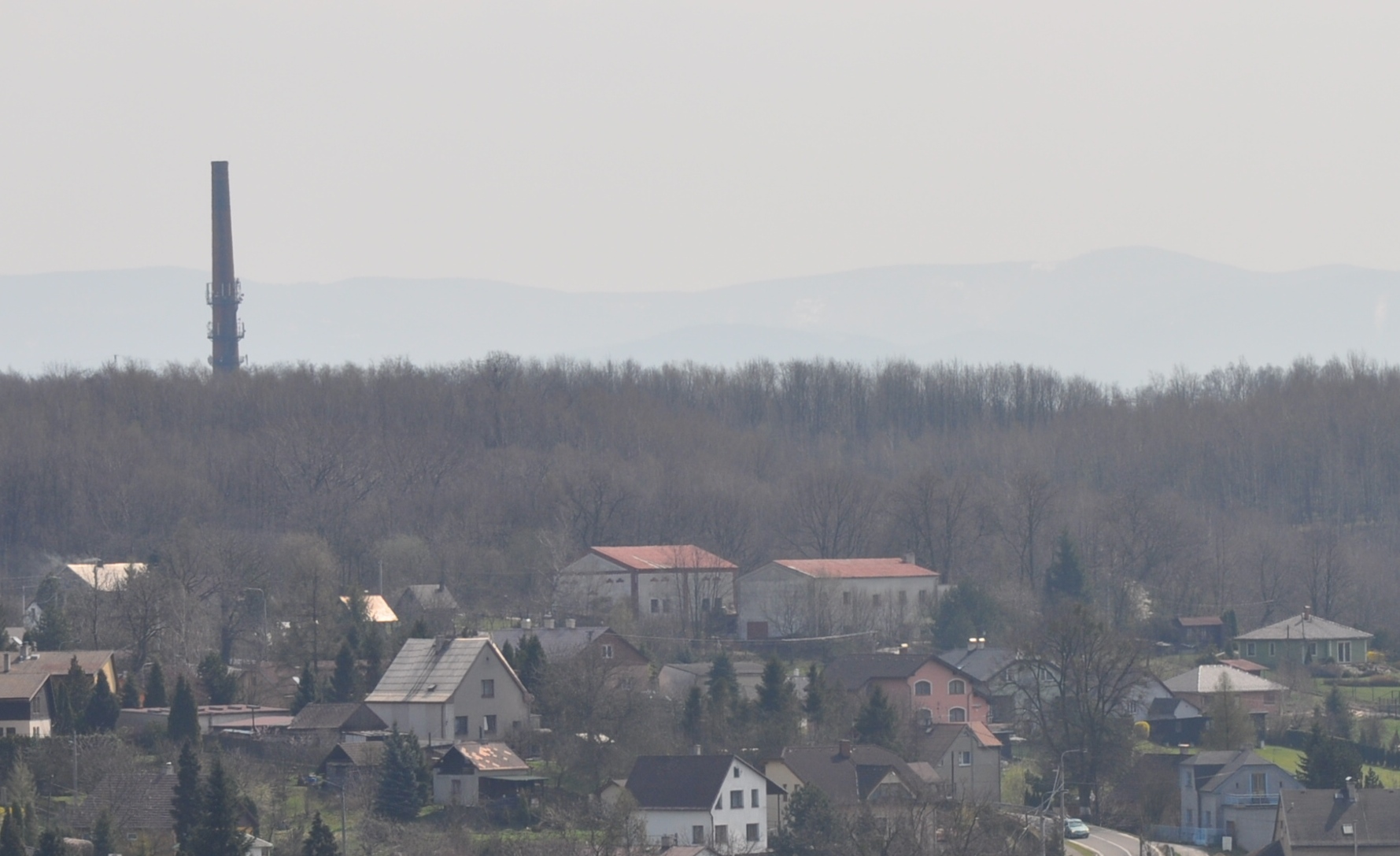 Důl Salma, dvě budovy větrní jámy dobývacího pole Salma. V pozadí tovární komín dolu Hedvika.